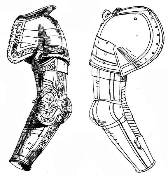 Ganze Kacheln an einem Armzeug (Vorder- und Rückseite)